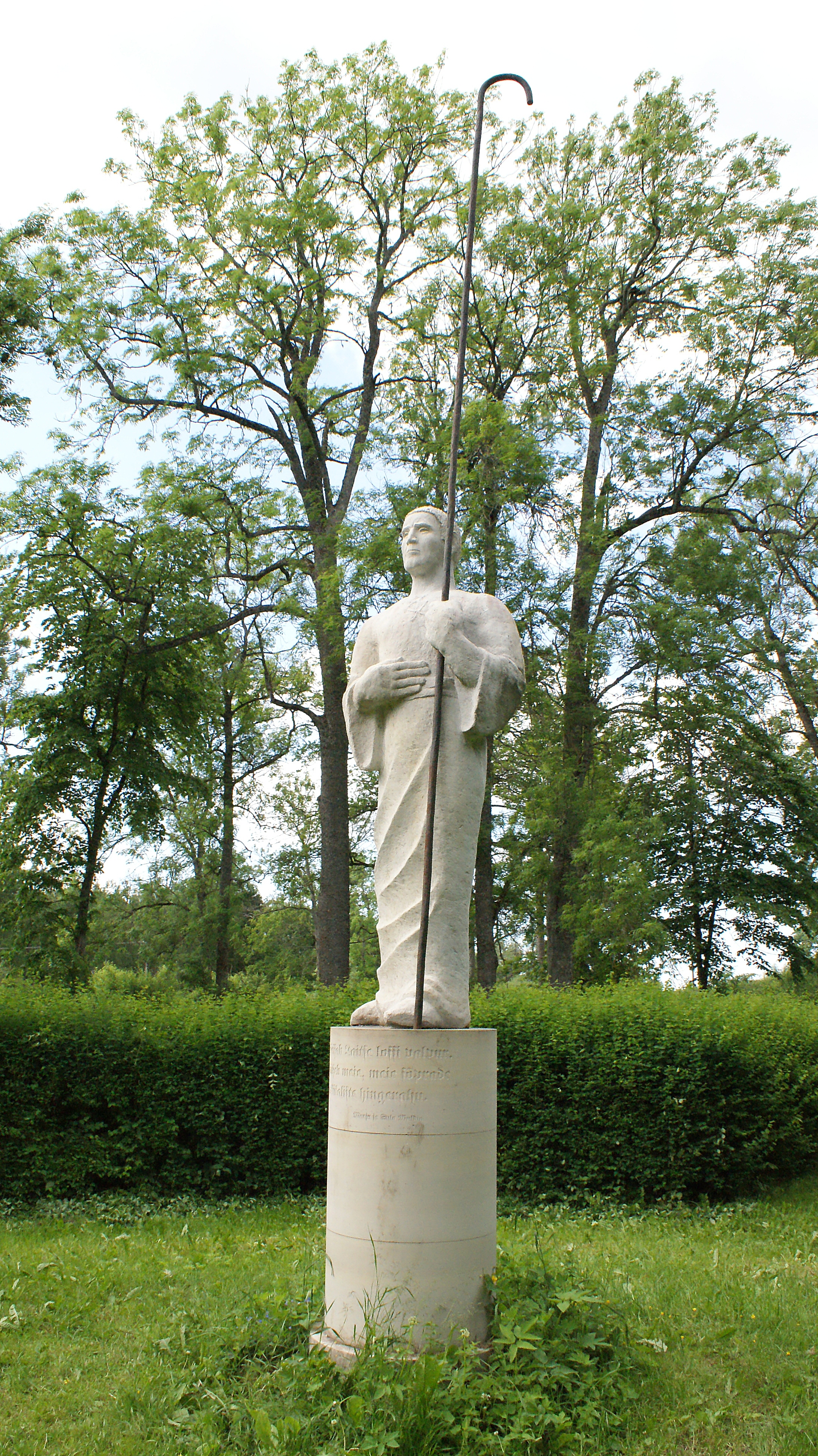 Kuju Laitse mõisa pargis